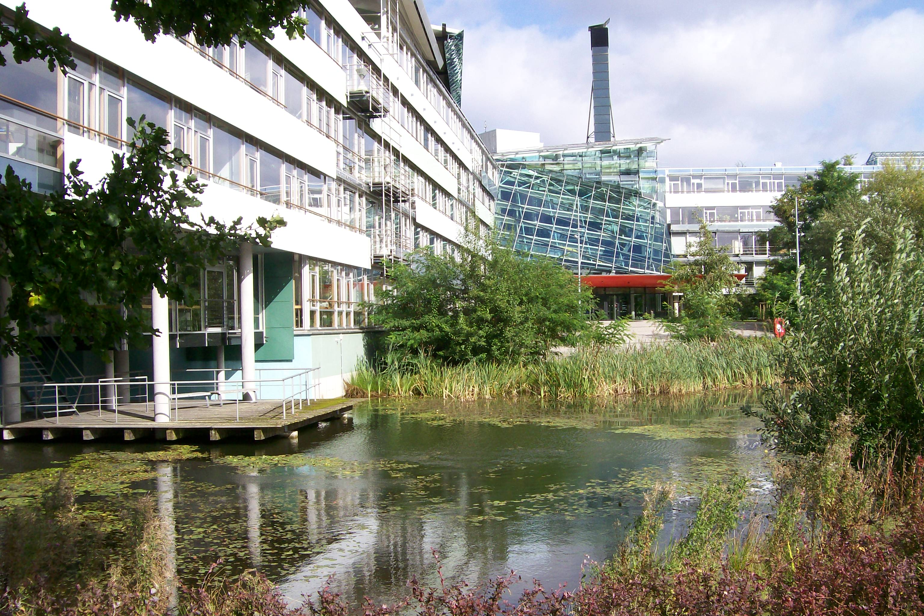 Gebäude des Hauptsitzes der Deutschen Rentenversicherung Nord in Lübeck, Ziegelstraße errichtet durch das Stuttgarter Büro Behnisch Architekten.